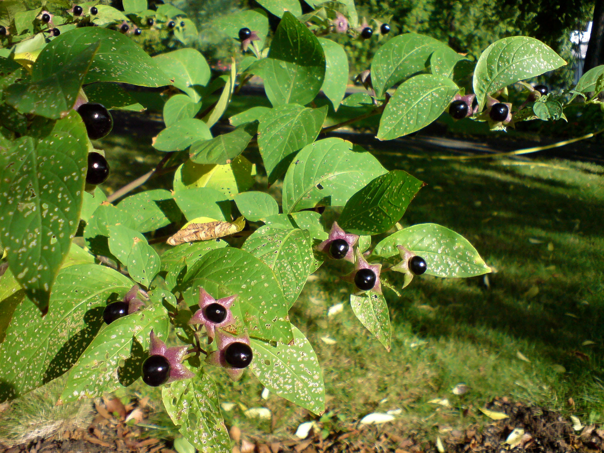 Atropa belladonna (Tollkirsche) - Botanischer Garten Leipzig